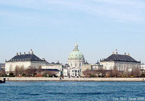 Amalienborg og Marmorkirken i København, Danmark.